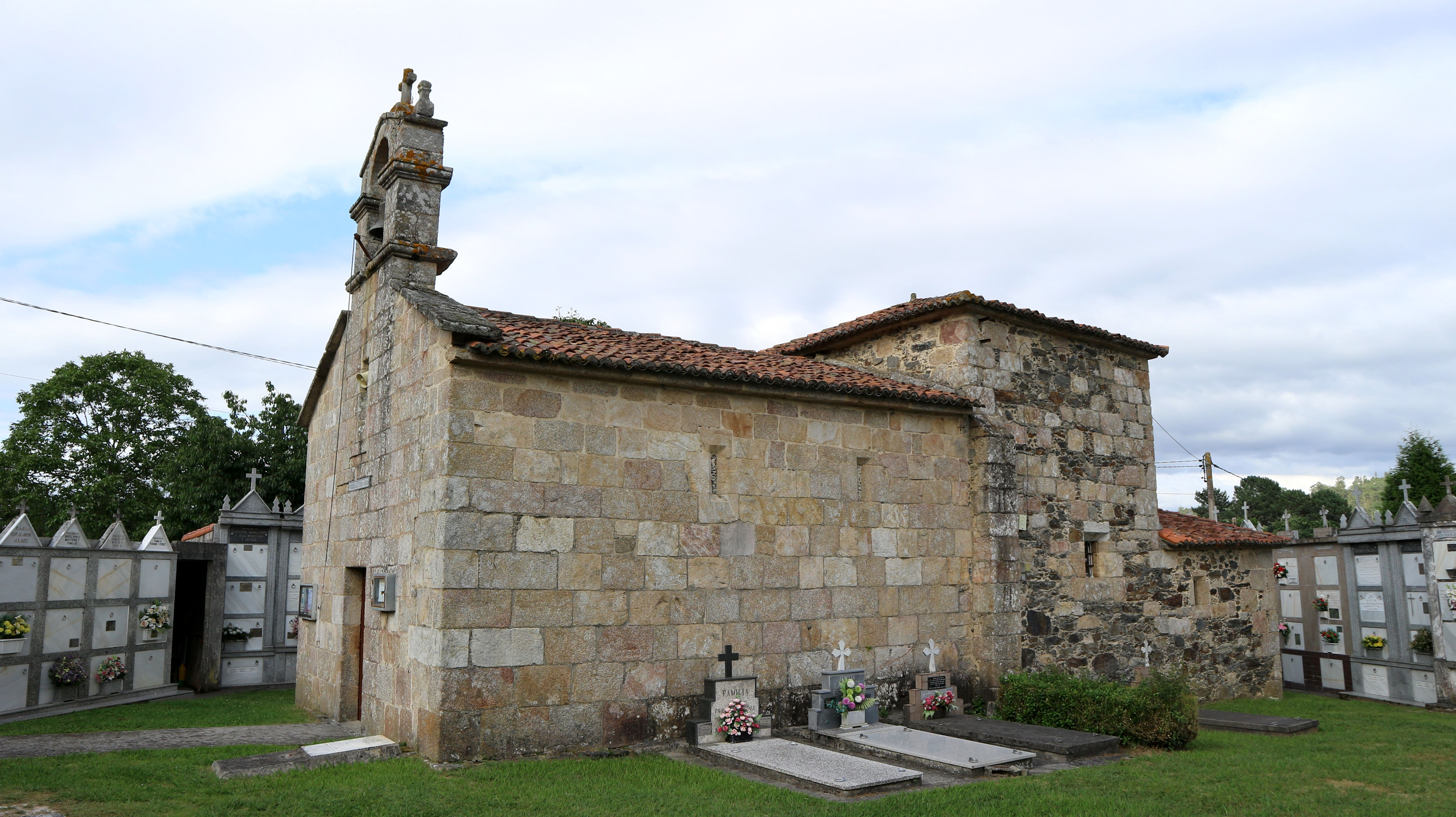 Igrexa de San Estevo de Parada. Parada, Oza-Cesuras.